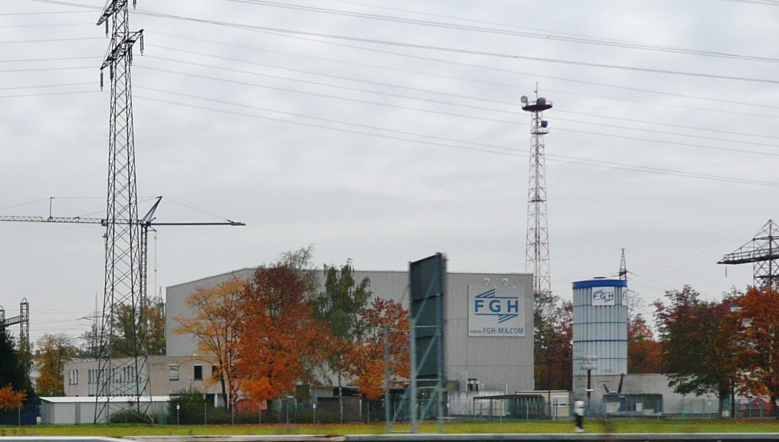 FGH Engineering & Test GmbH (CESI Group) in Mannheim-Rheinau, Hochspannungs- und Hochleistungsprüffeld